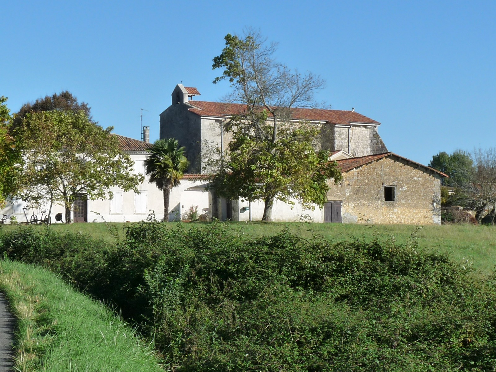 Vue du sud, centre-bourg et église, Neuvicq, Charente-Maritime, France